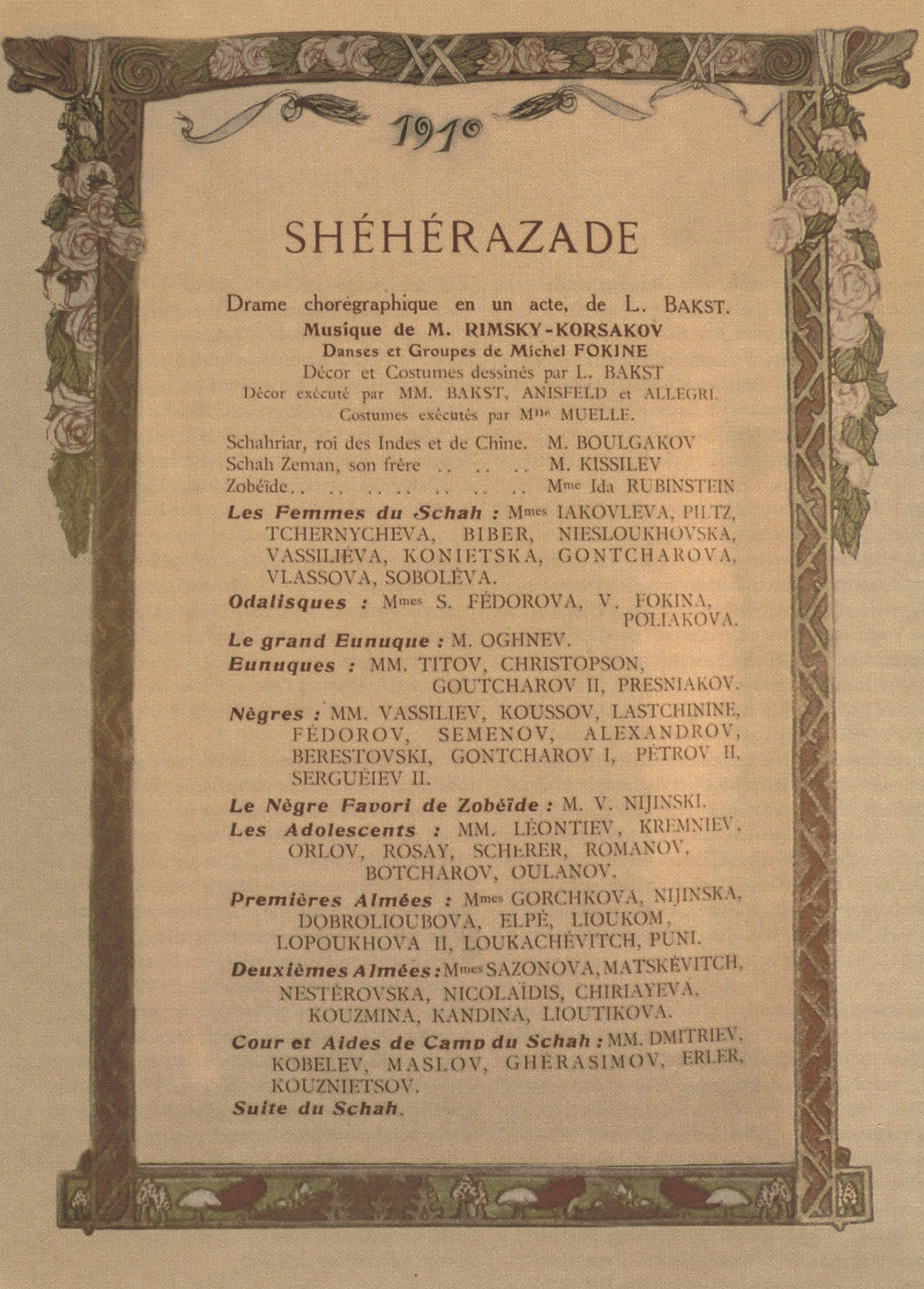 Das Besetzungszettel der Uraauffuehrung, Juni 1910